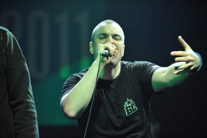 koncert